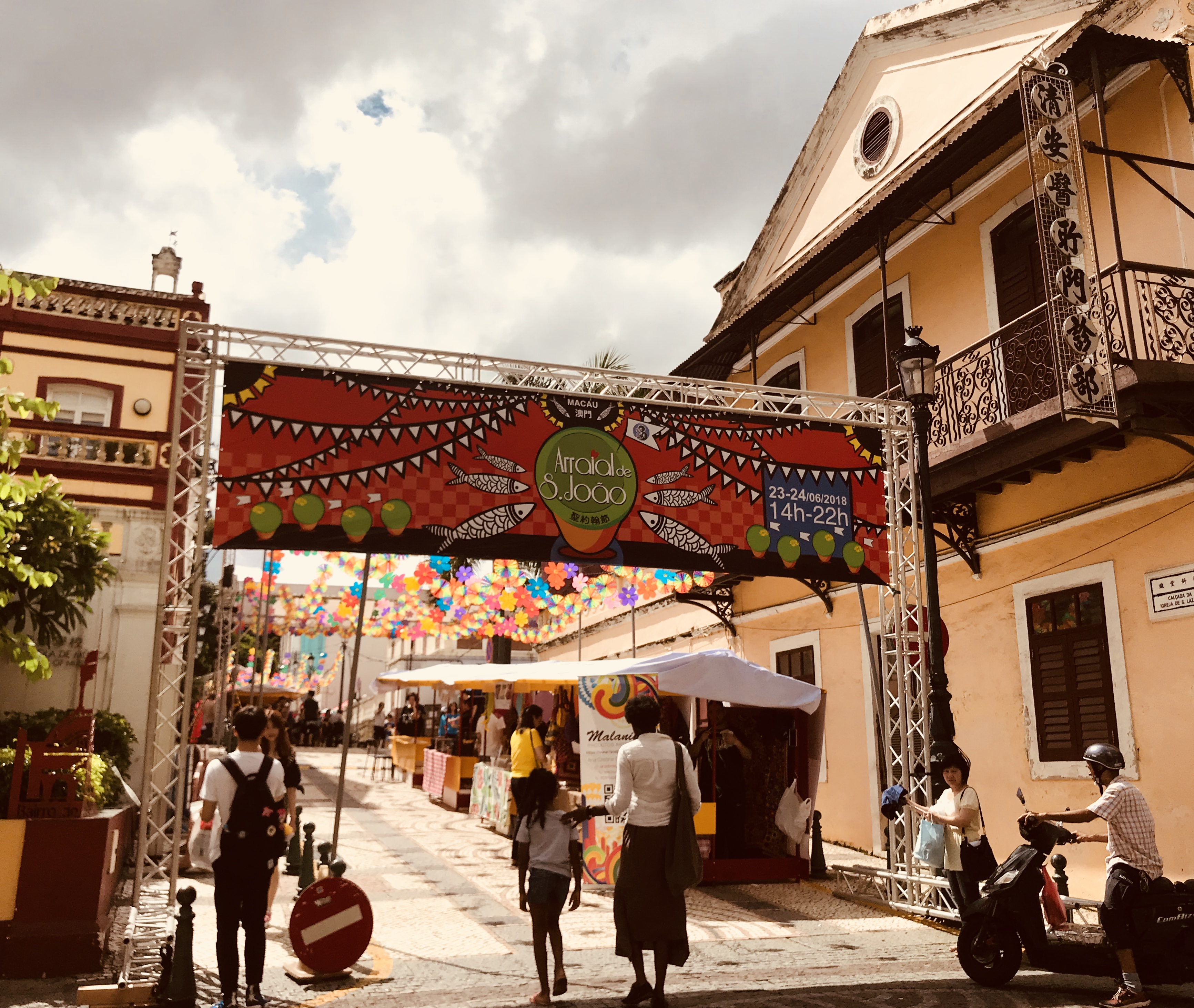 中文（台灣）: 澳門聖若翰節2018